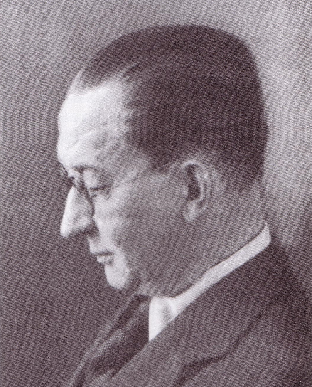 Profilfotografie des Chirurgen Prof. Dr. Georg Ernst Konjetzny